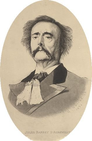 Portrait (caricature) of Jules Amédée Barbey d'Aurevilly